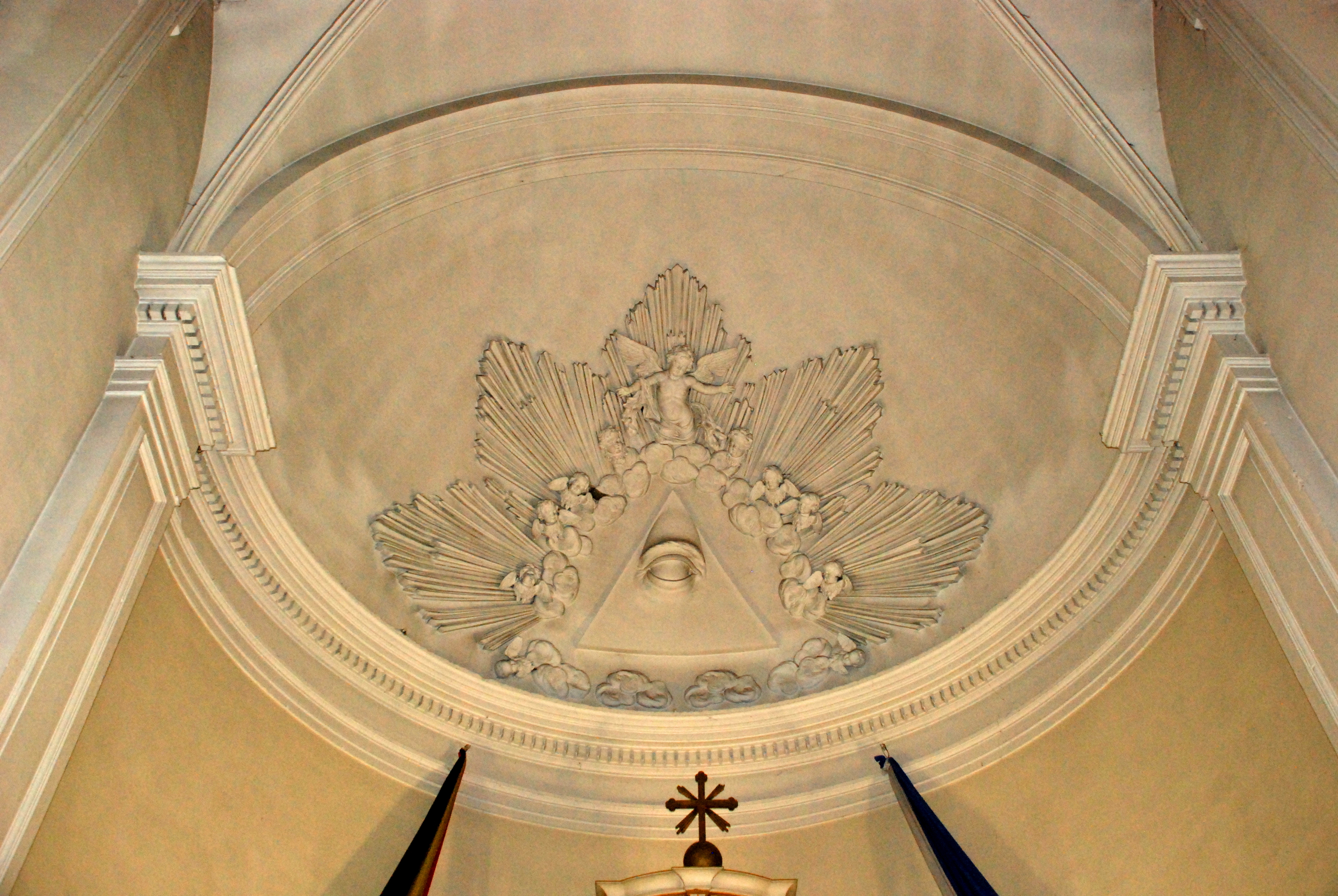 Belgique - Bousval - Église Saint-Barthélemy de Bousval